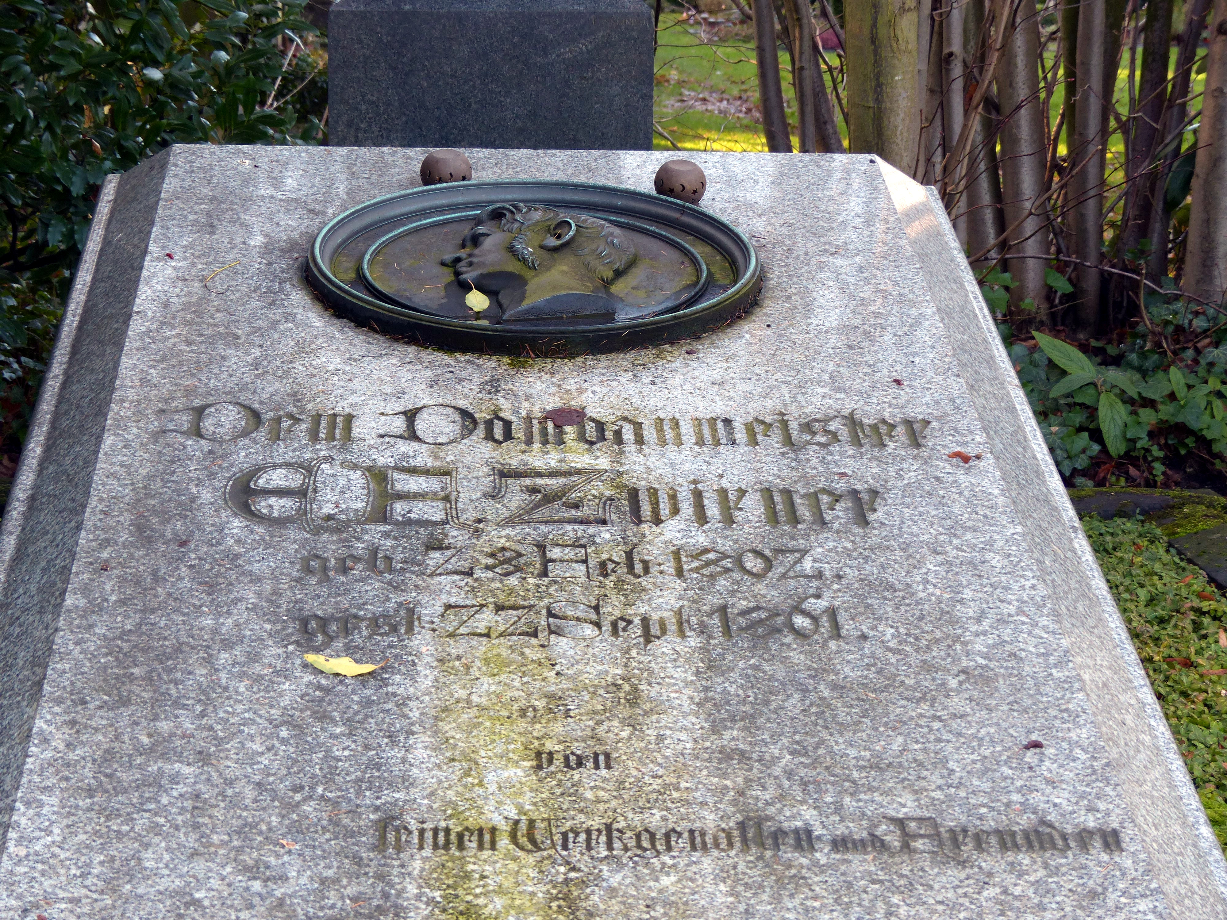 Grabstelle von Ernst Friedrich Zwirner (1802 -1861), Friedhof Melaten, HWG, zwischen Lit K und Lit L, Grabplatte von L. Siegert und Porträtmedaillon von Christian Mohr